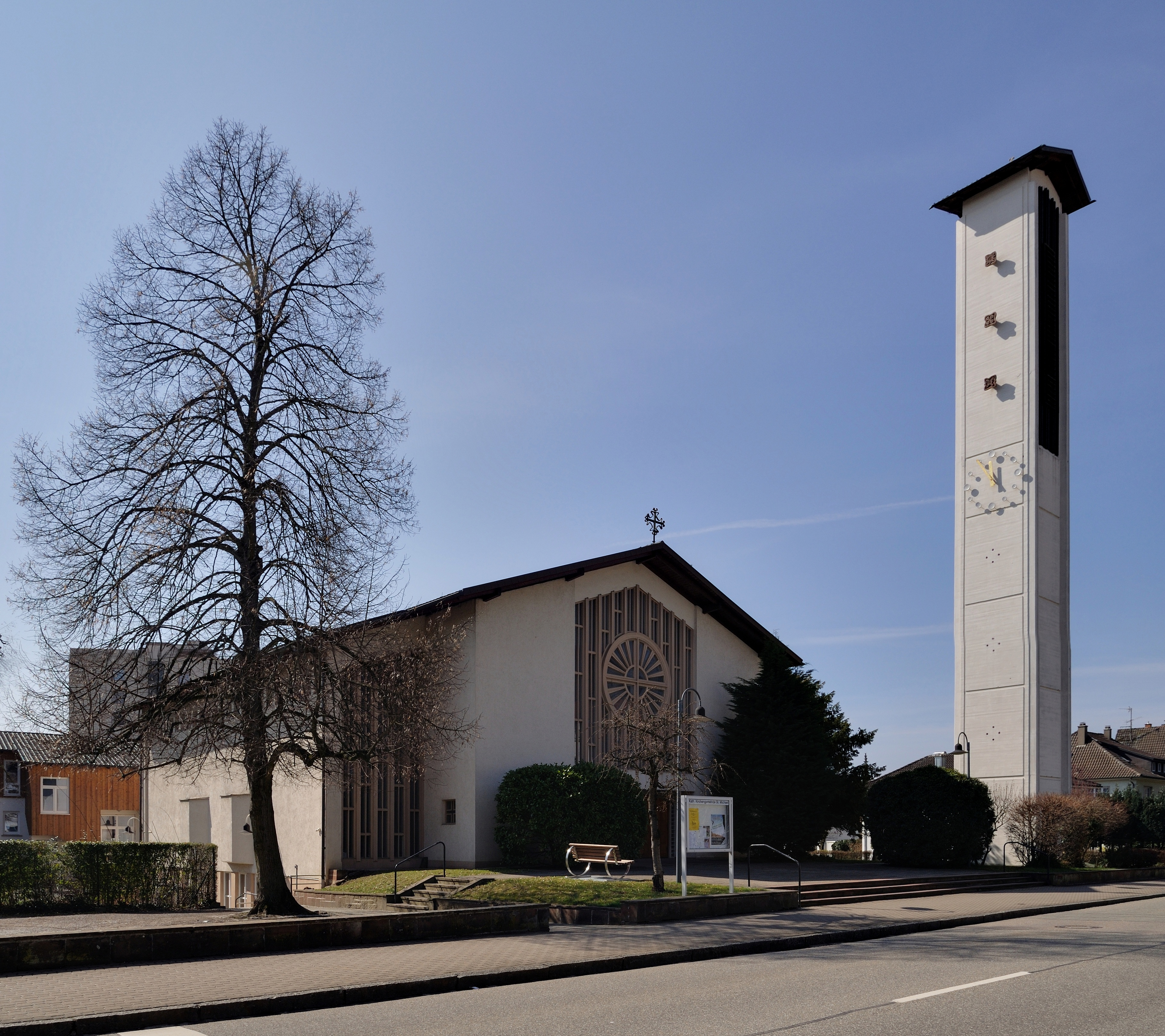 Grenzach: Michaelskirche, Gesamtansicht von Nordosten